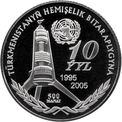 Памятная монета Туркменистана